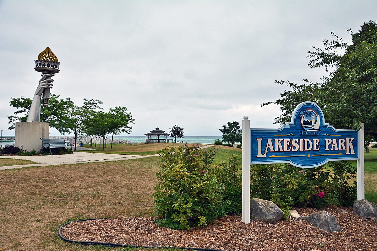 Rogers City, Michigan (Lakeside Park)